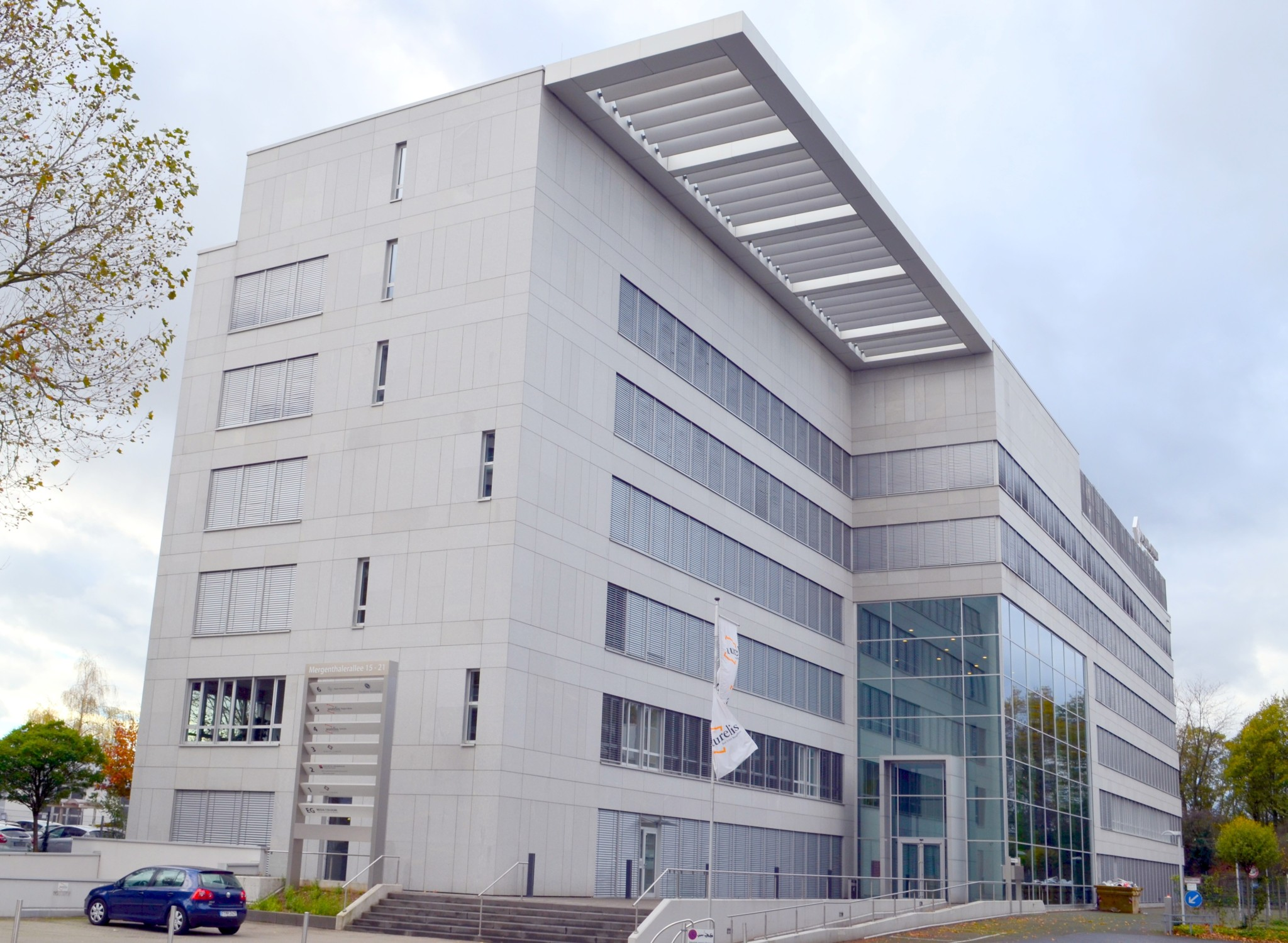 Aurelis Hauptsitz in Eschborn, eigenes Werk vom 03. November 2013